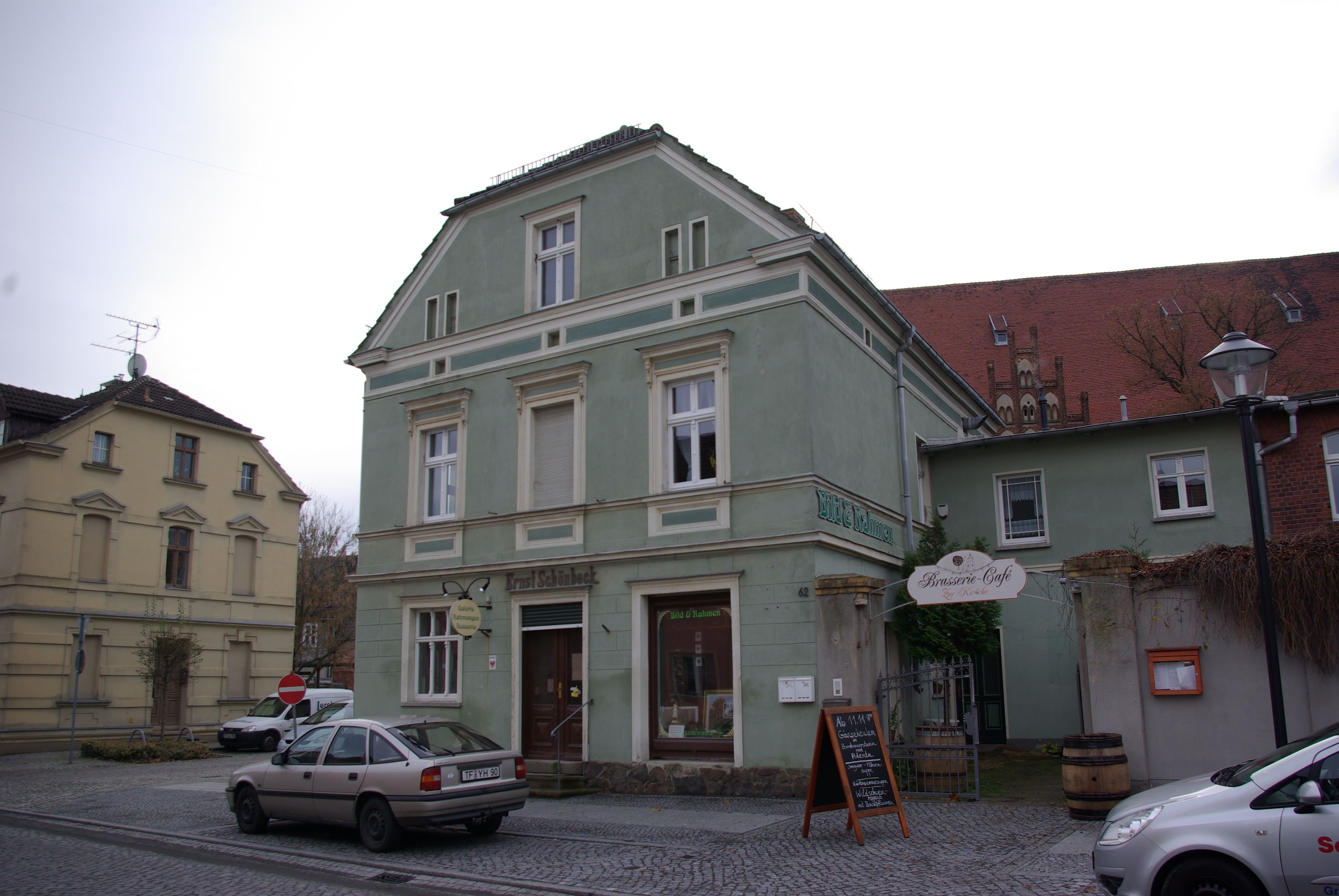 Jüterbog in Brandenburg. Das Haus in der Straße Planeberg 62 steht unter Denkmalschutz. Es wurde in der Mitte des 18. Jahrhunderts erbaut, und 1857 und 1888 umgebaut.